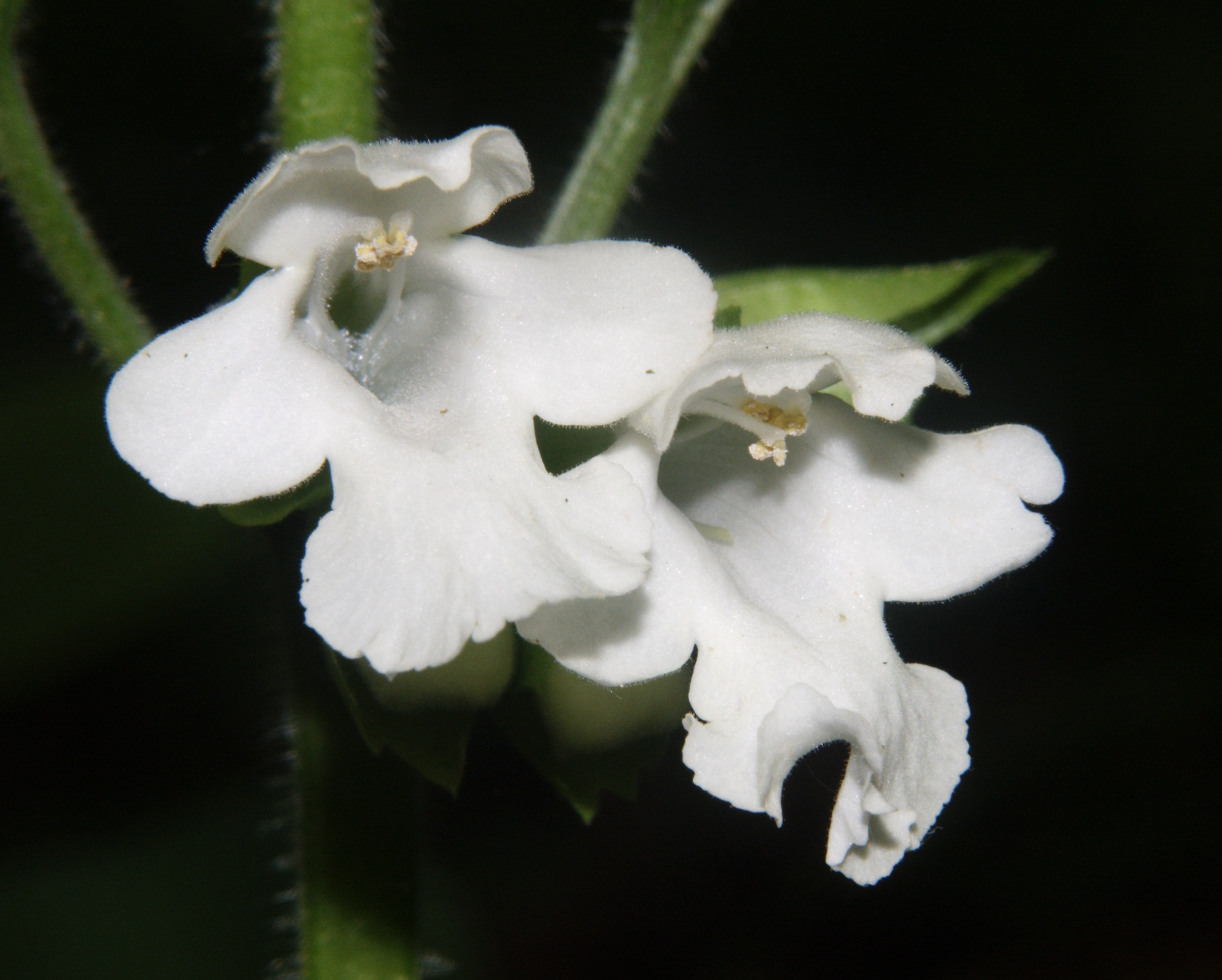 Melittis melissophyllum, Hohenloher Land, Germany